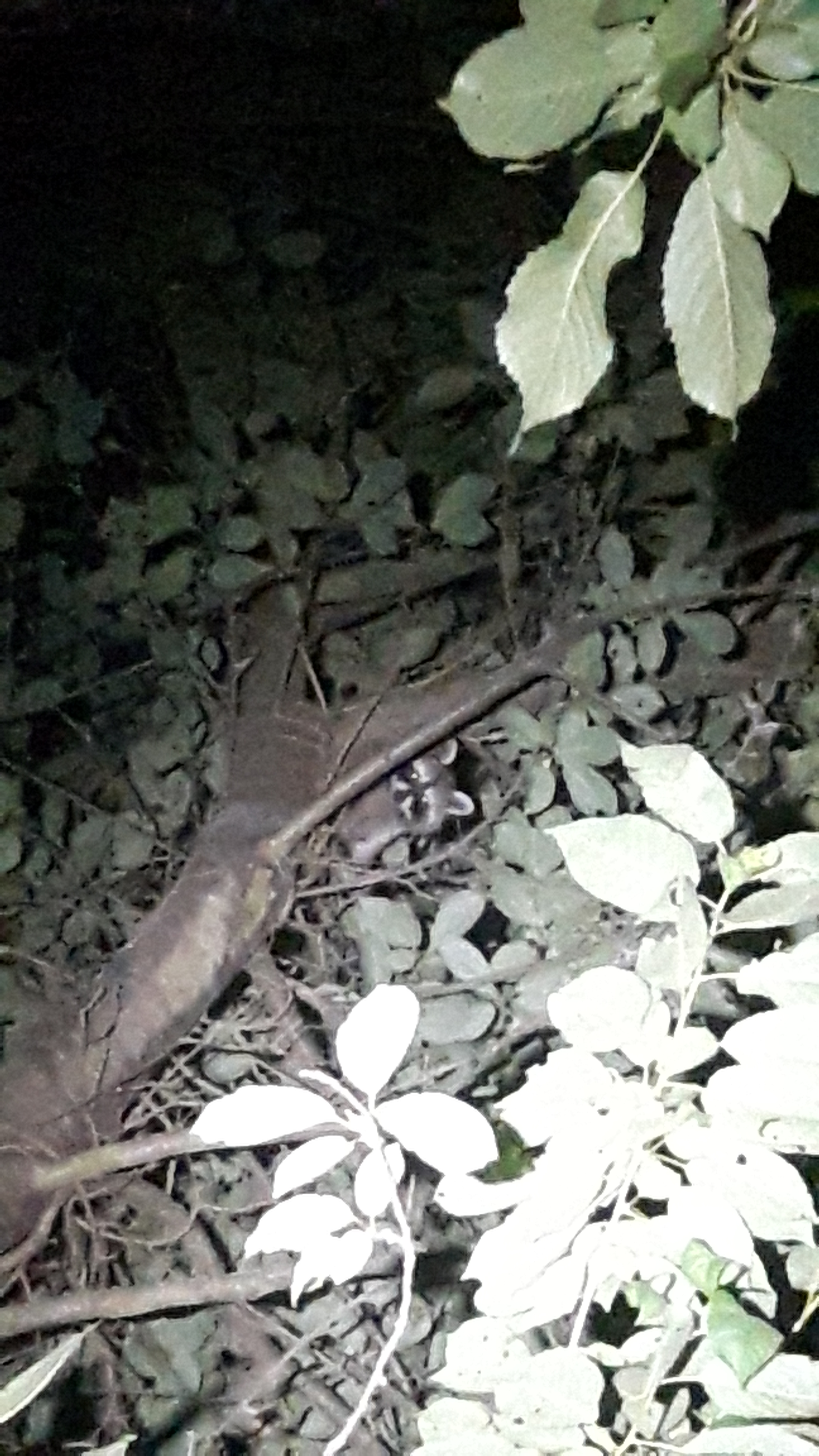 (NSG:HE-1438007)_Affelderchen und Rettichbruch von Klein-Welzheim